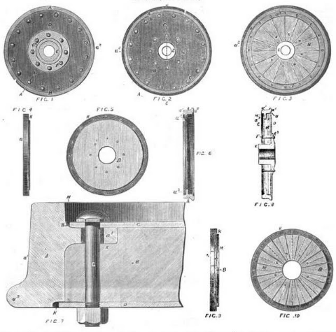 Allen's elastische Eisenbahn-Wagenräder